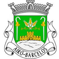 Brasão da freguesia de Airó no Concelho de Barcelos em Portugal